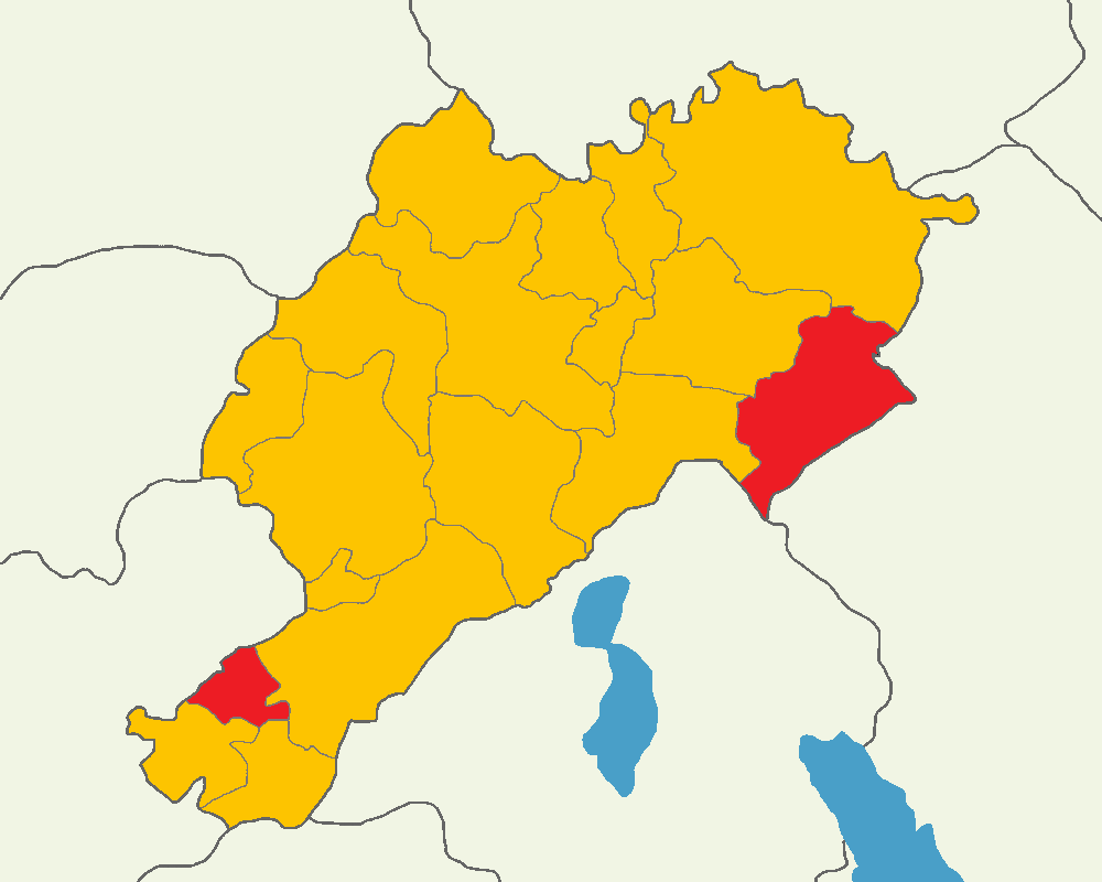 Afyonkarahisar'da 2014 Türkiye cumhurbaşkanlığı seçimi